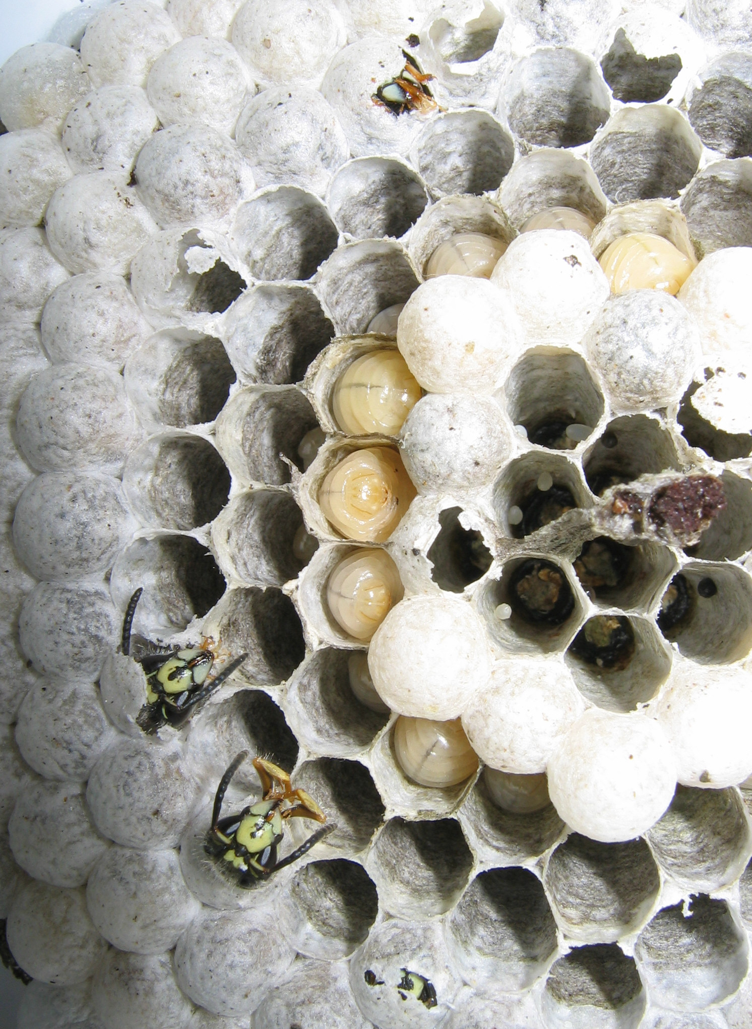 bovenaanzicht wespenraat. Eigen werk, GFDL.